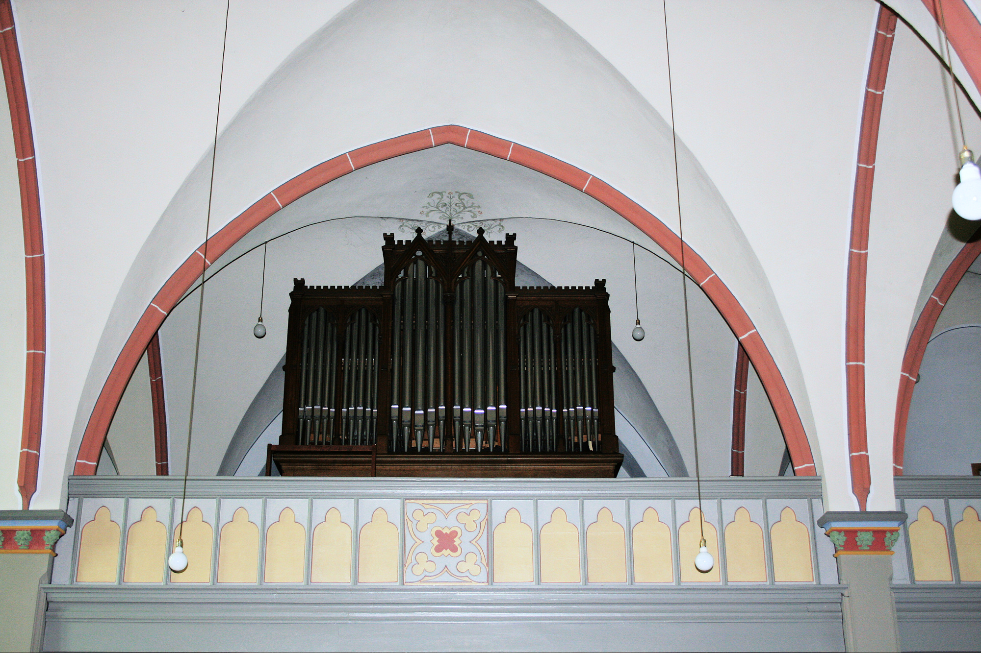 Ruppichteroth-Schönenberg, Chor der kath. Kirche